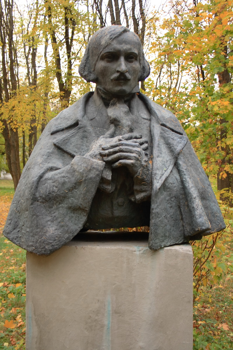 Микола Гоголь. Пам'ятник у парку міста Яготин Київської області